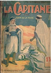 La Capitane, couverture du roman de Jean de la Hire, éditions J. Ferenczi & fils, 1926. Illustration d'Henri Armengol.